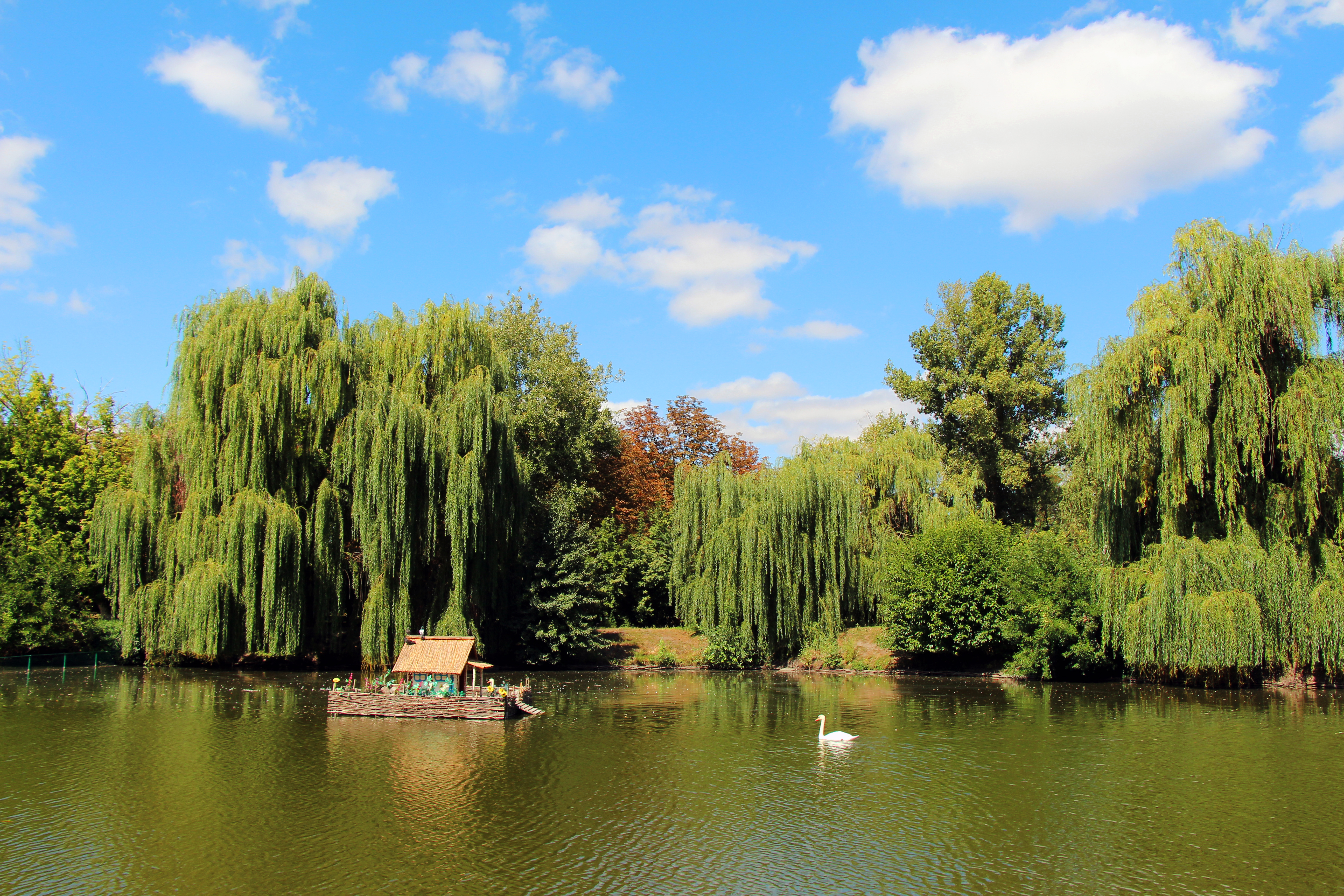 Урочище «Березовий гай», м. Миргород